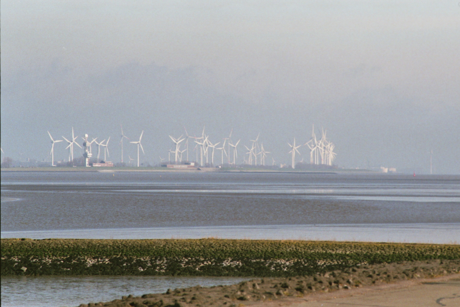 Uitzicht op de overzijde van de Eems (Knock) Camera: Canon Eos 3000 Film: Fujifilm Superia X-tra 400 ISO Lens: Tamron AF70-300MM